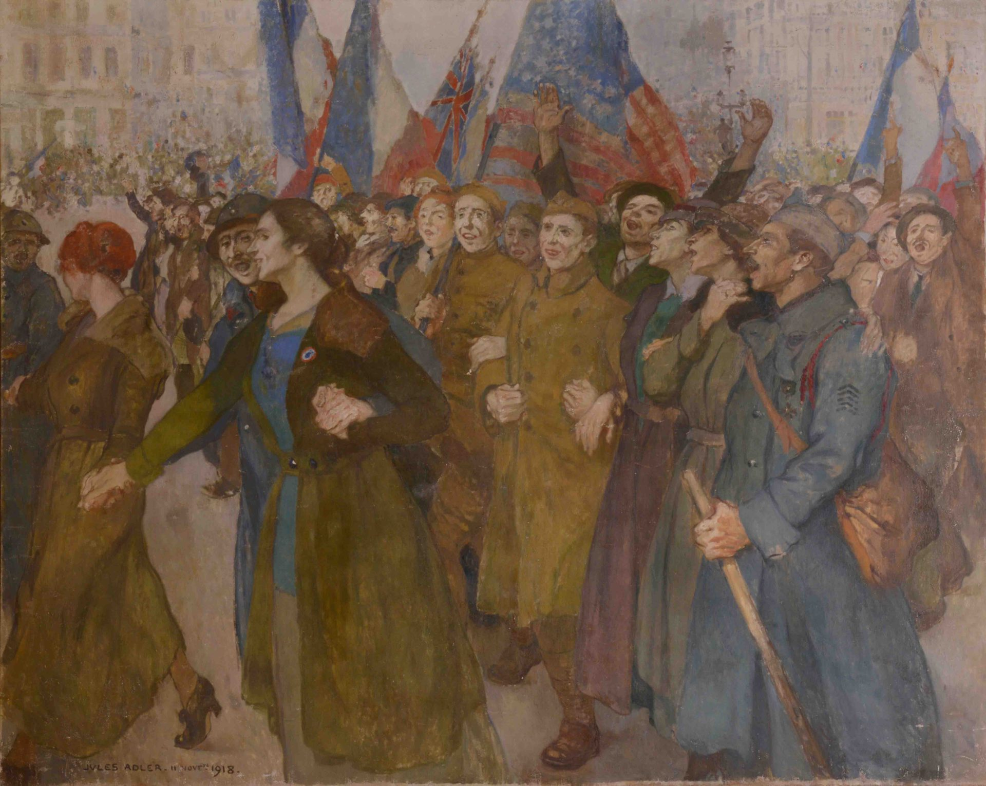 L’armistice de 1918. Cette huile sur toile.